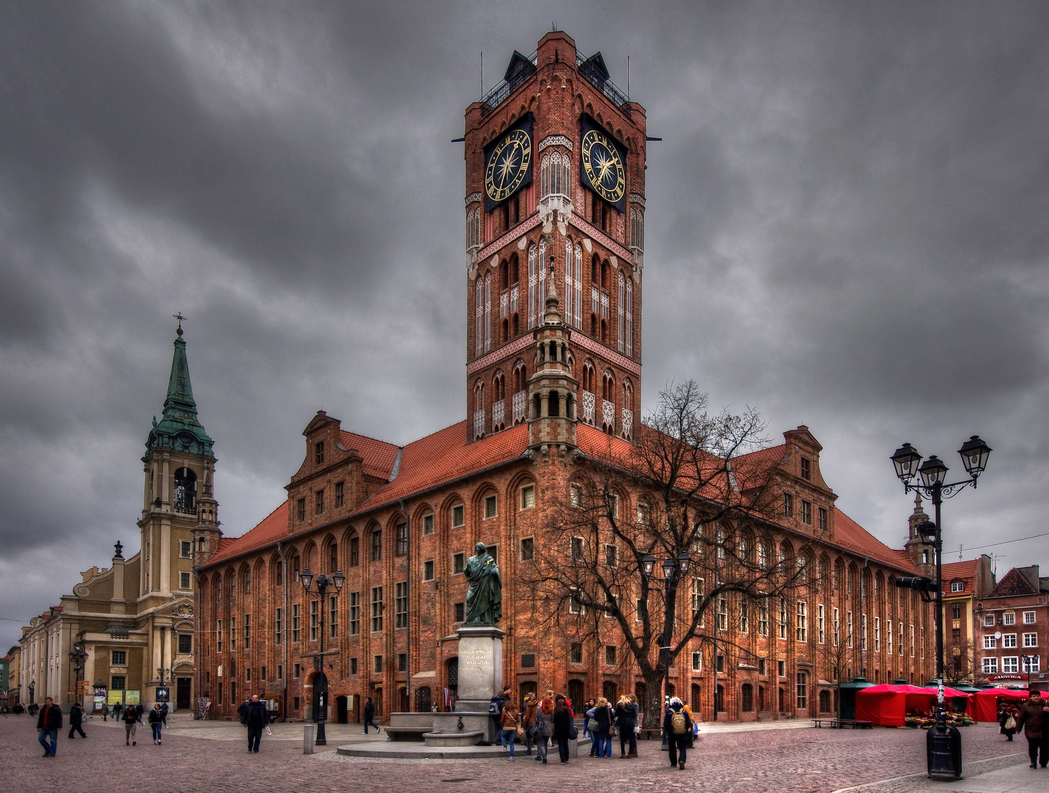 Toruń, ratusz staromiejski, ob. Muzeum OKręgowe, 2 poł. XIII, 1391-1399, 1861